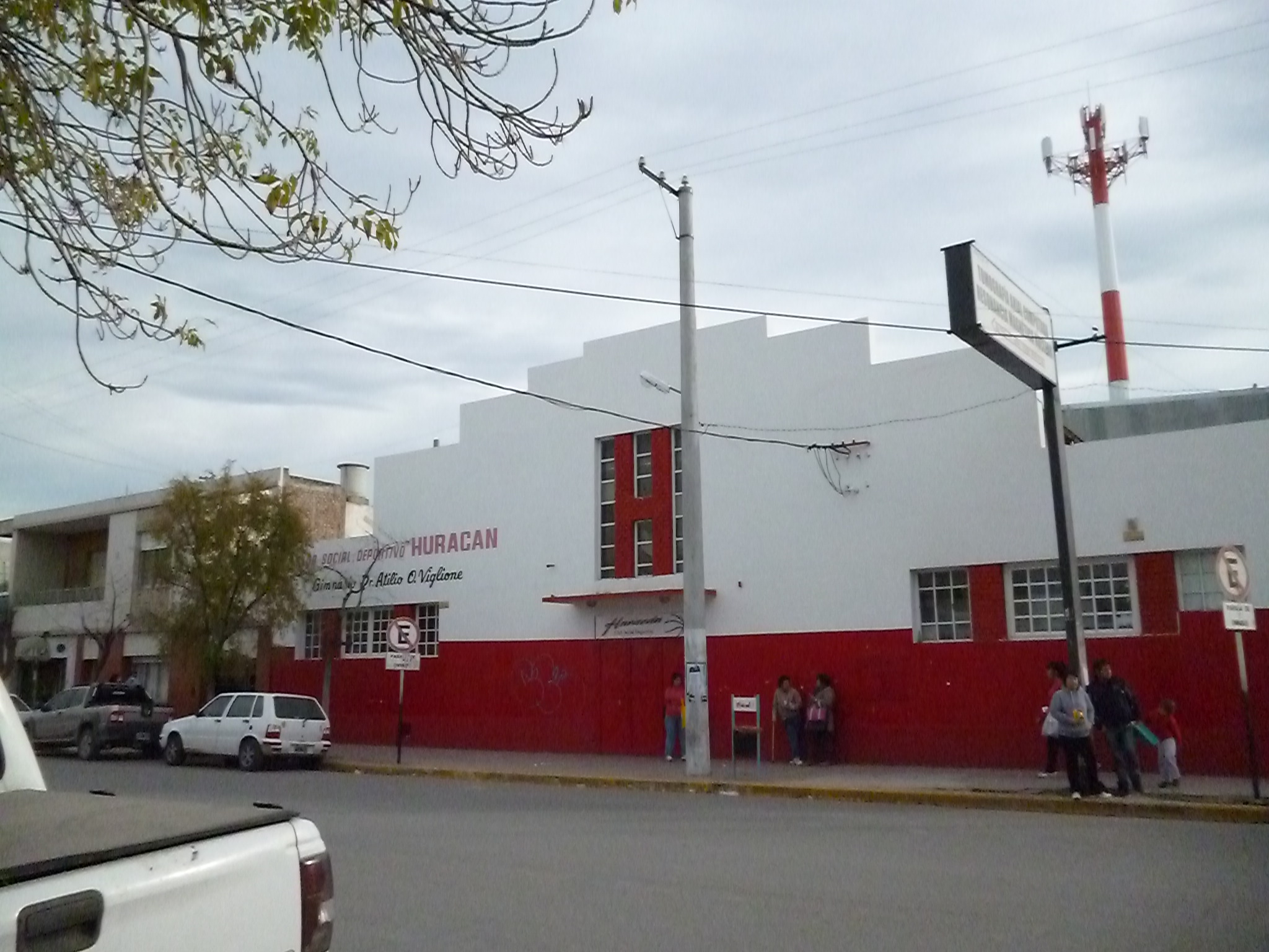 Sede Huracan de Trelew